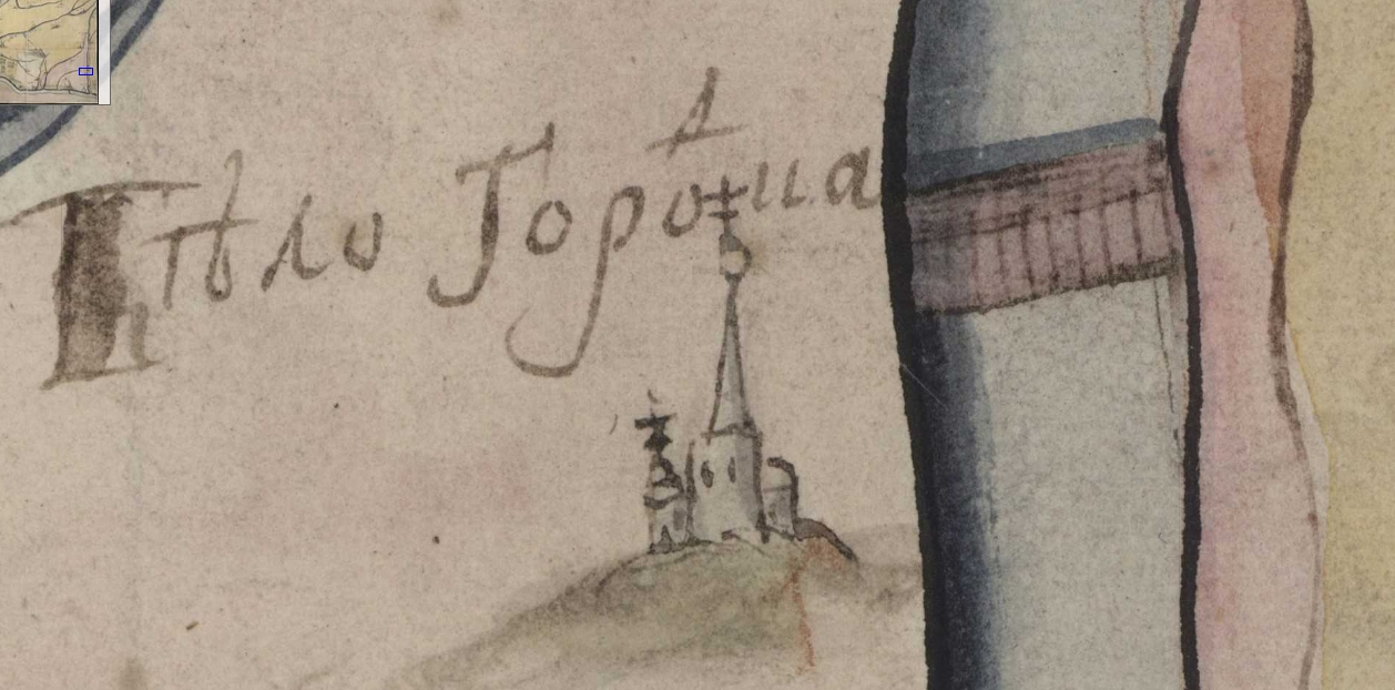 Фрагмент карти Київської губернії. XVIII століття. РГАДА, ф. 192, оп. 1, Киевская губ., № 5.